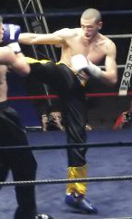 Coup de pied circulaire